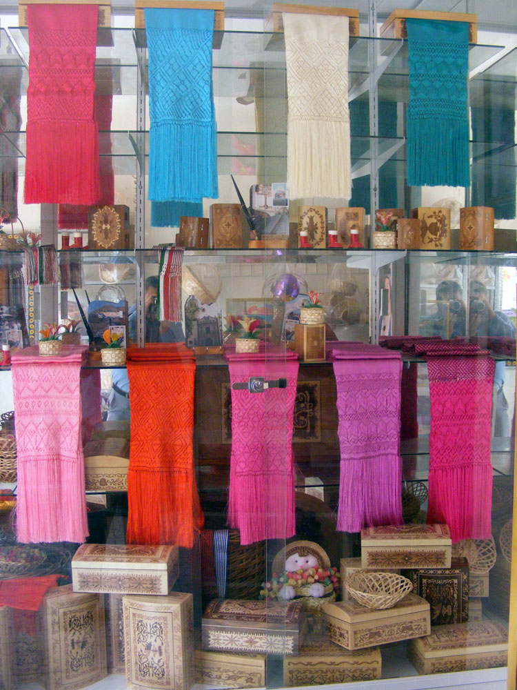 Vitrina exponiendo rebozos y chalinas de Santa María del Río, SLP